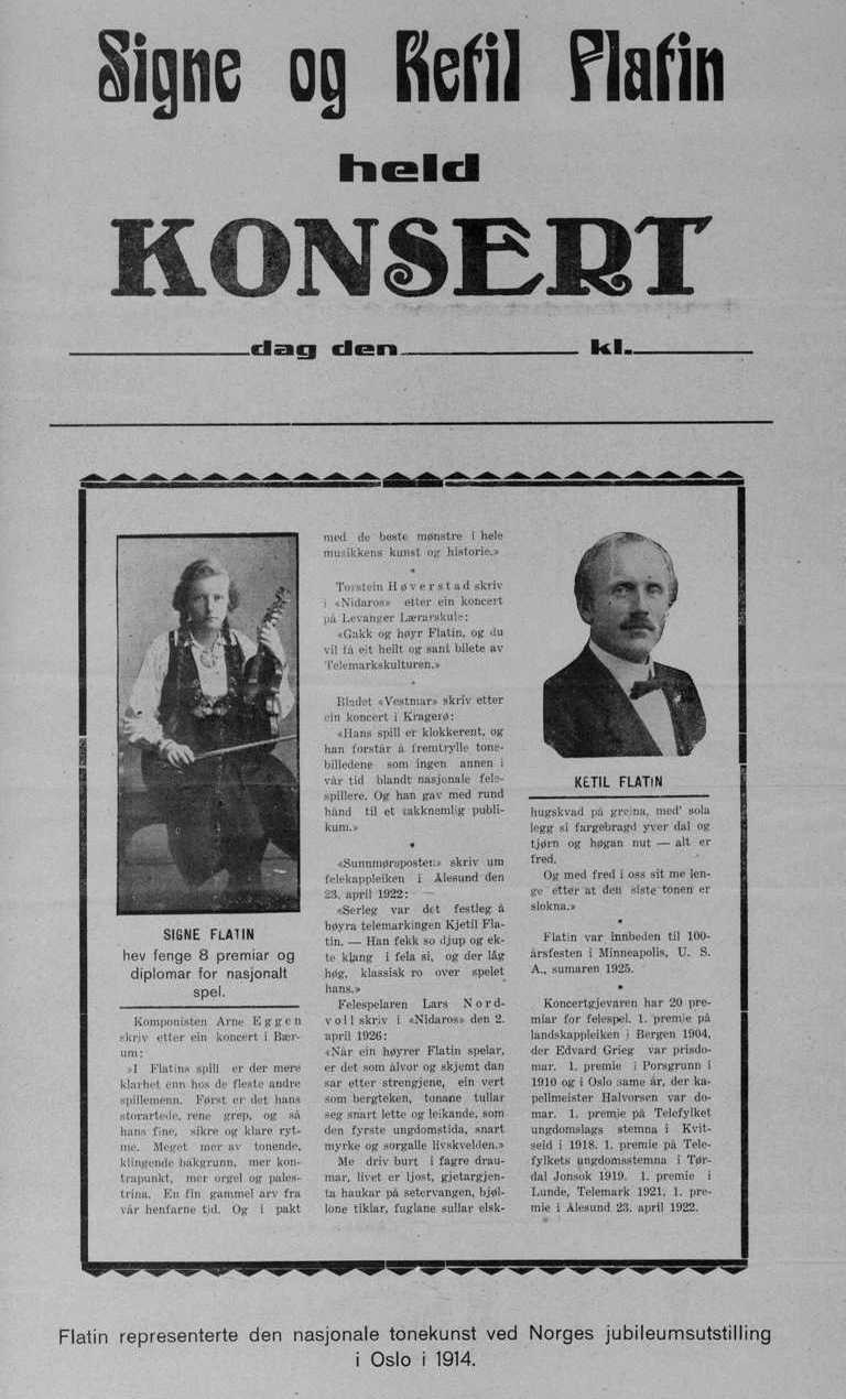 Signe og Kjetil Flatin